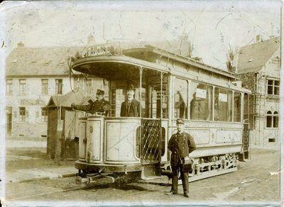 Jungfernfahrt der Linie nach Bürgel am 20. Oktober 1907